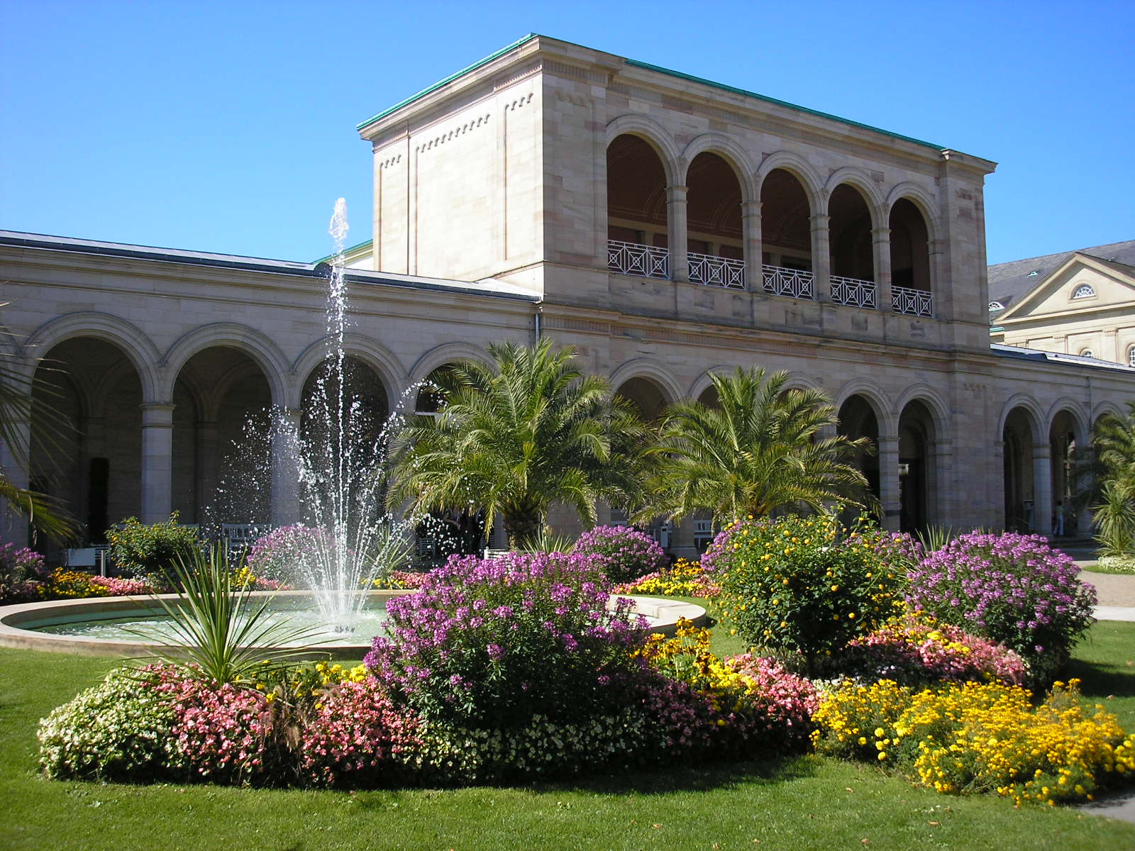 In den Kuranlagen von Bad Kissingen (Unterfranken).